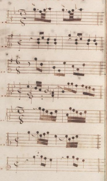 Table du volume VI des manuscrits de Venise (incipit des sonates 8 à 14, K. 304 à 309).